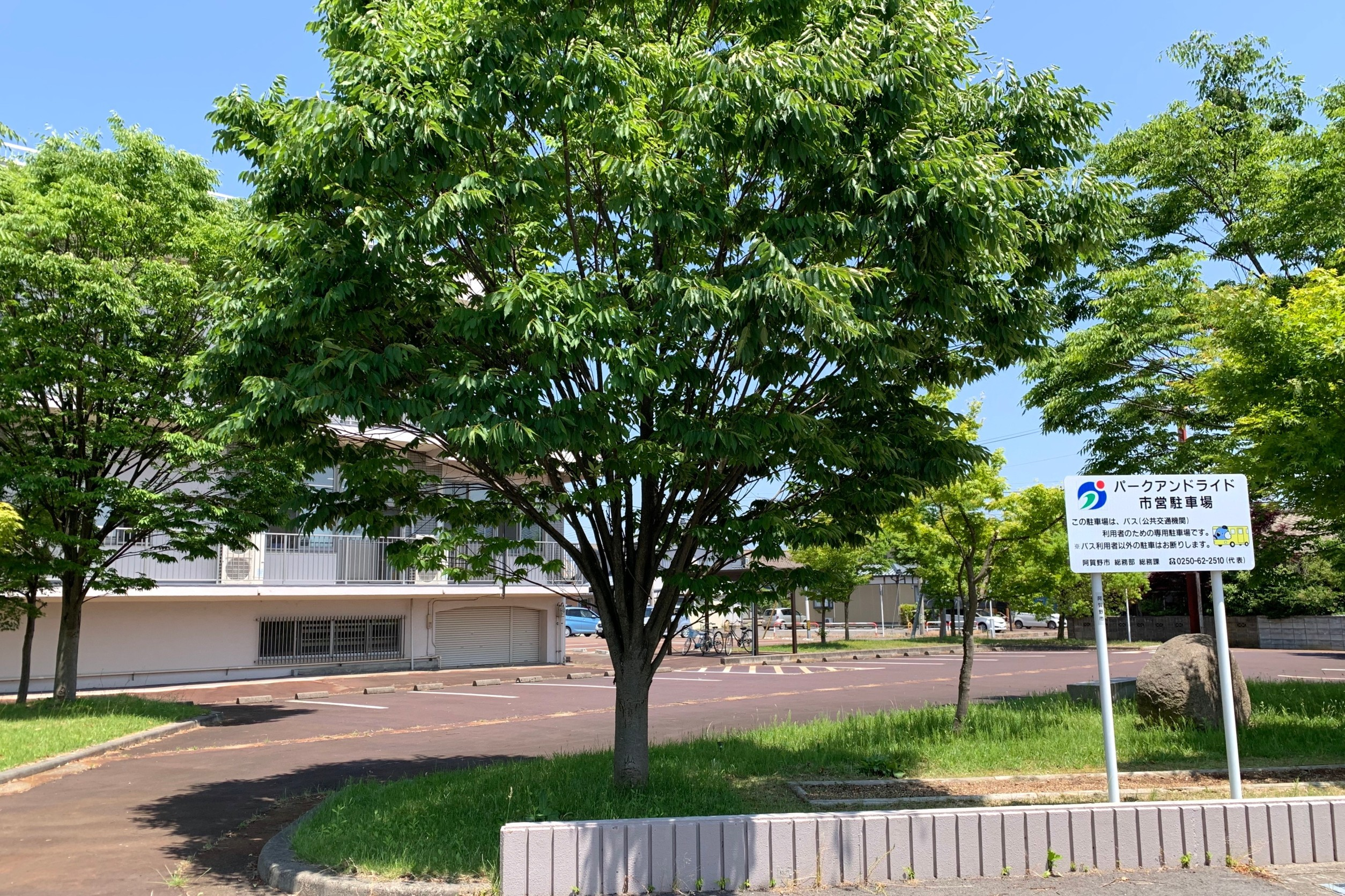 阿賀野市役所京ヶ瀬支所前にある無料パークアンドライド駐車場（2020年6月）国道49号沿いにあり、同国道などを走るバス利用者に設けられた。